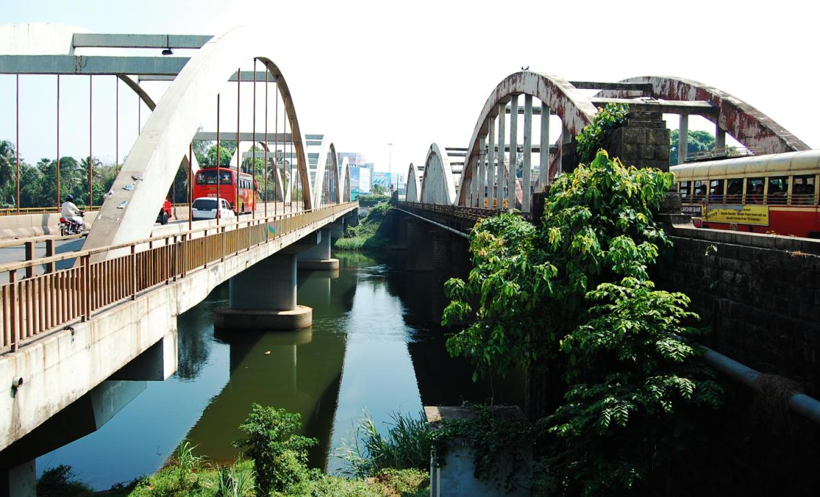 Marthandavarma bridge, Aluva